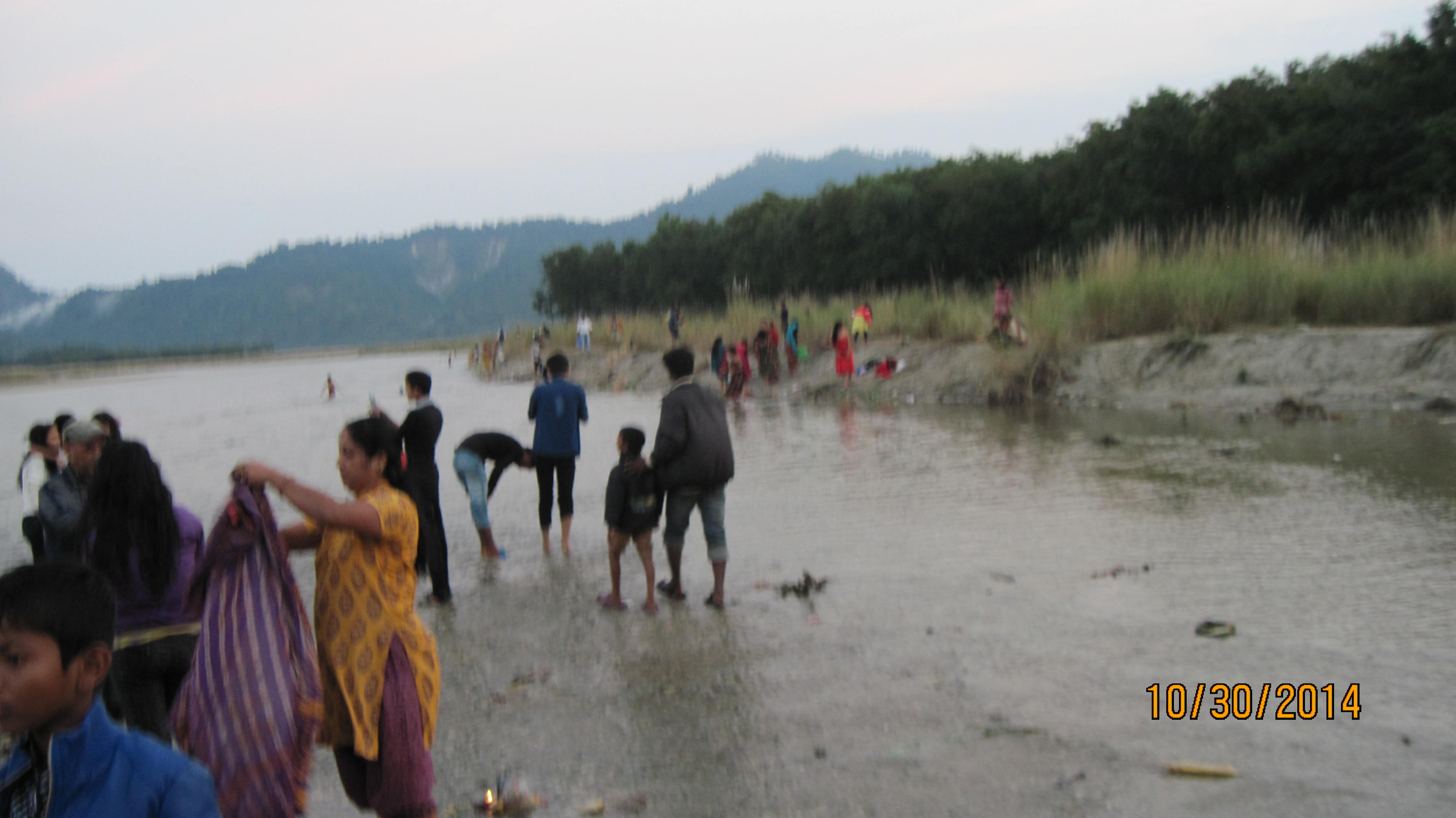 नेपाली: छठ पूजा २०७१ काे एक झलक